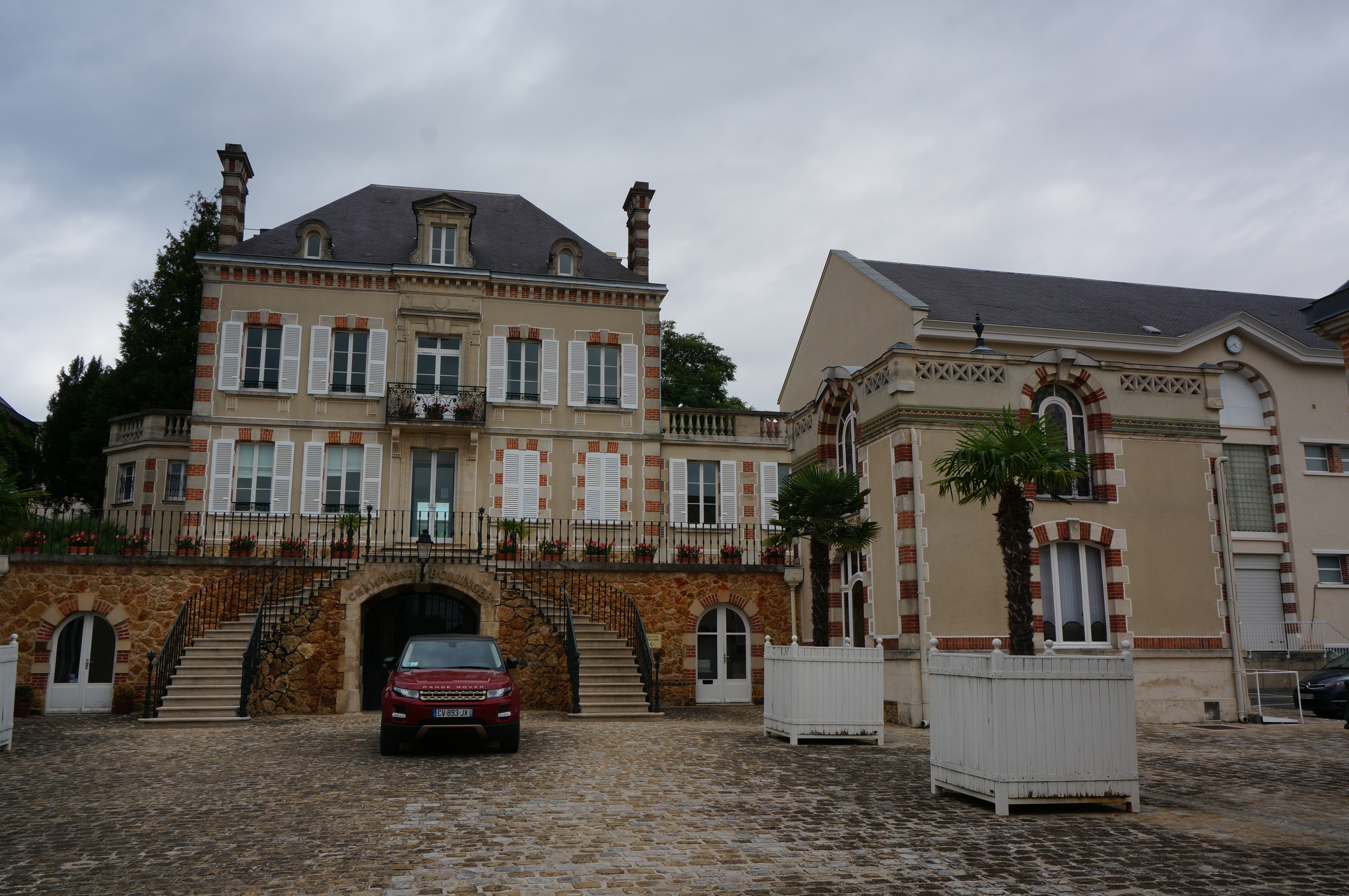 Vue de la cour d'honneur, rue Jeanson,à Ay.